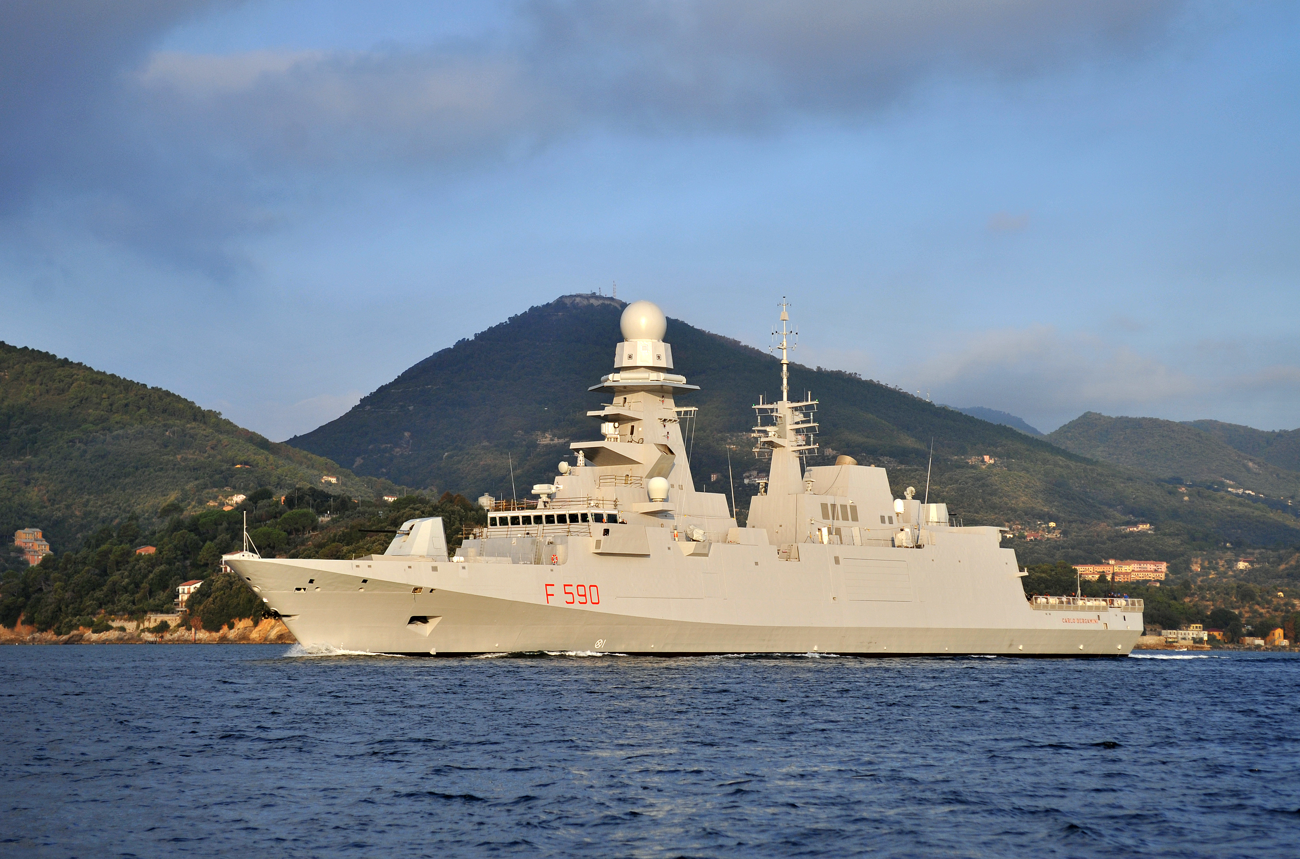 Prima uscita in mare di Nave Bergamini (2011)